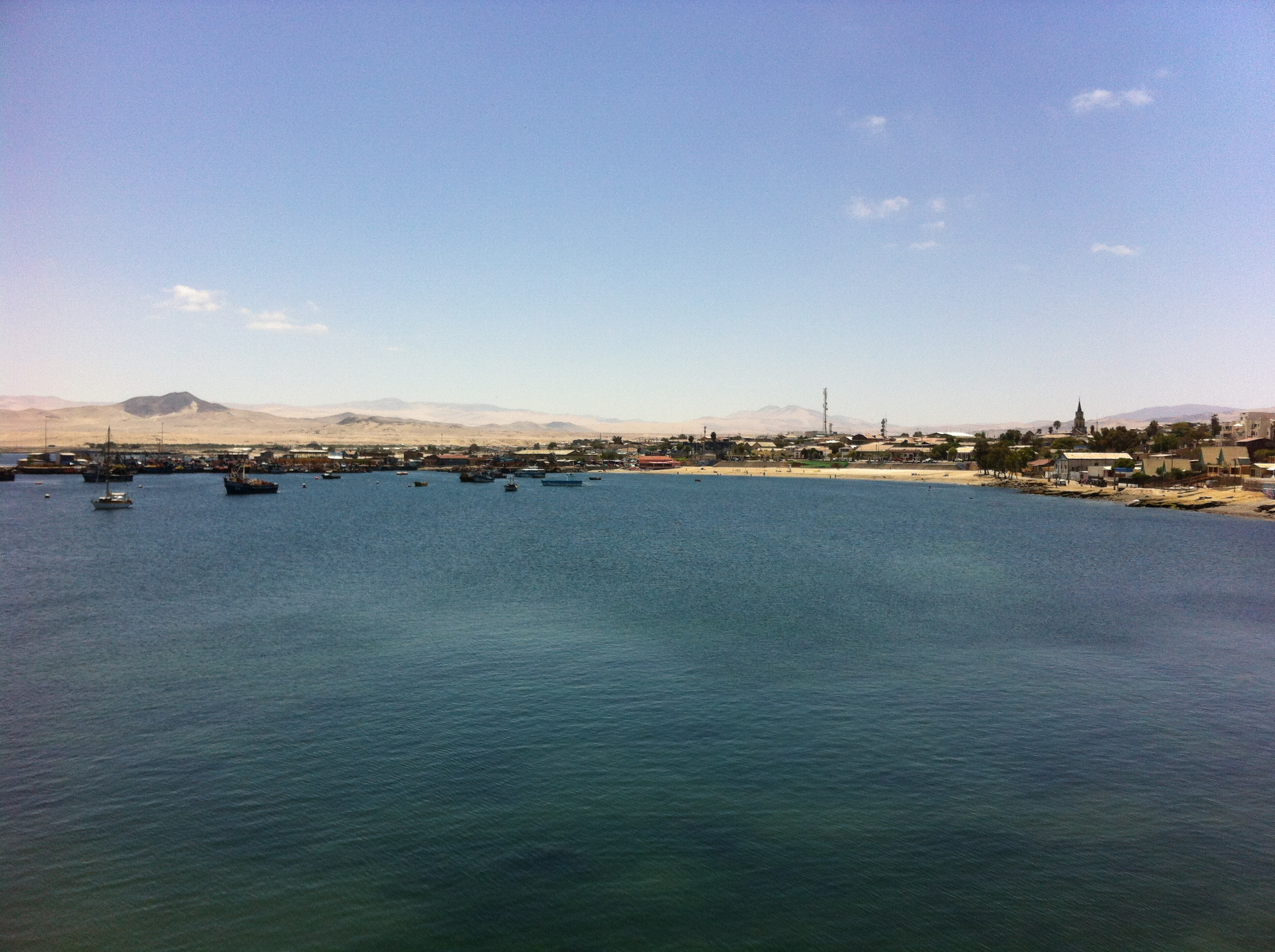 Plaza Carlos Condell, Caldera, Chile.